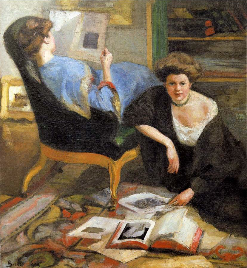 Die Lesenden. (Breyers Frau und „Nini“). Öl auf Leinwand, 150 x 136 cm. Signiert und 1909 datiert